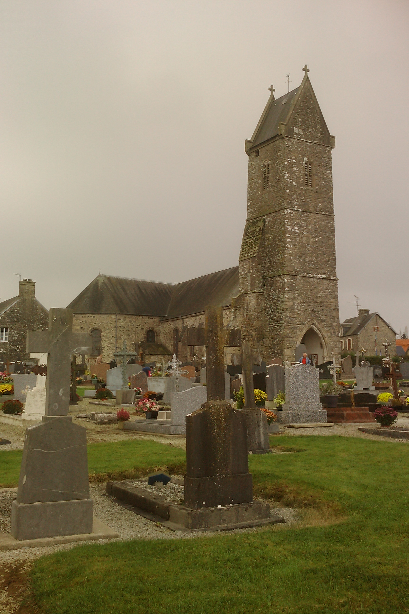 Église Notre-Dame en l'Assomption de Cambernon